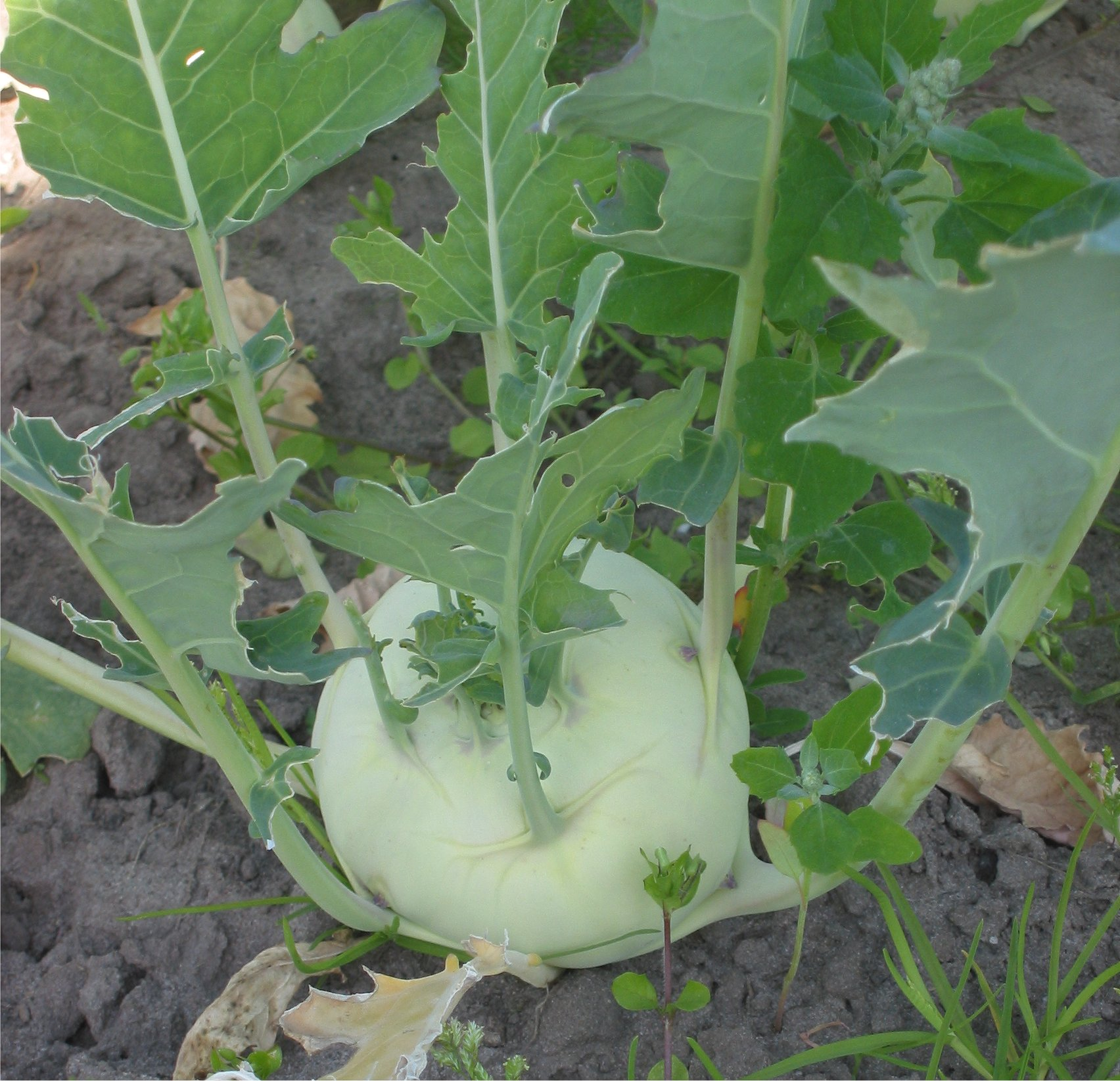 (nl: Koolrabi) Brassica oleracea convar. acephala alef. var. gongylodes